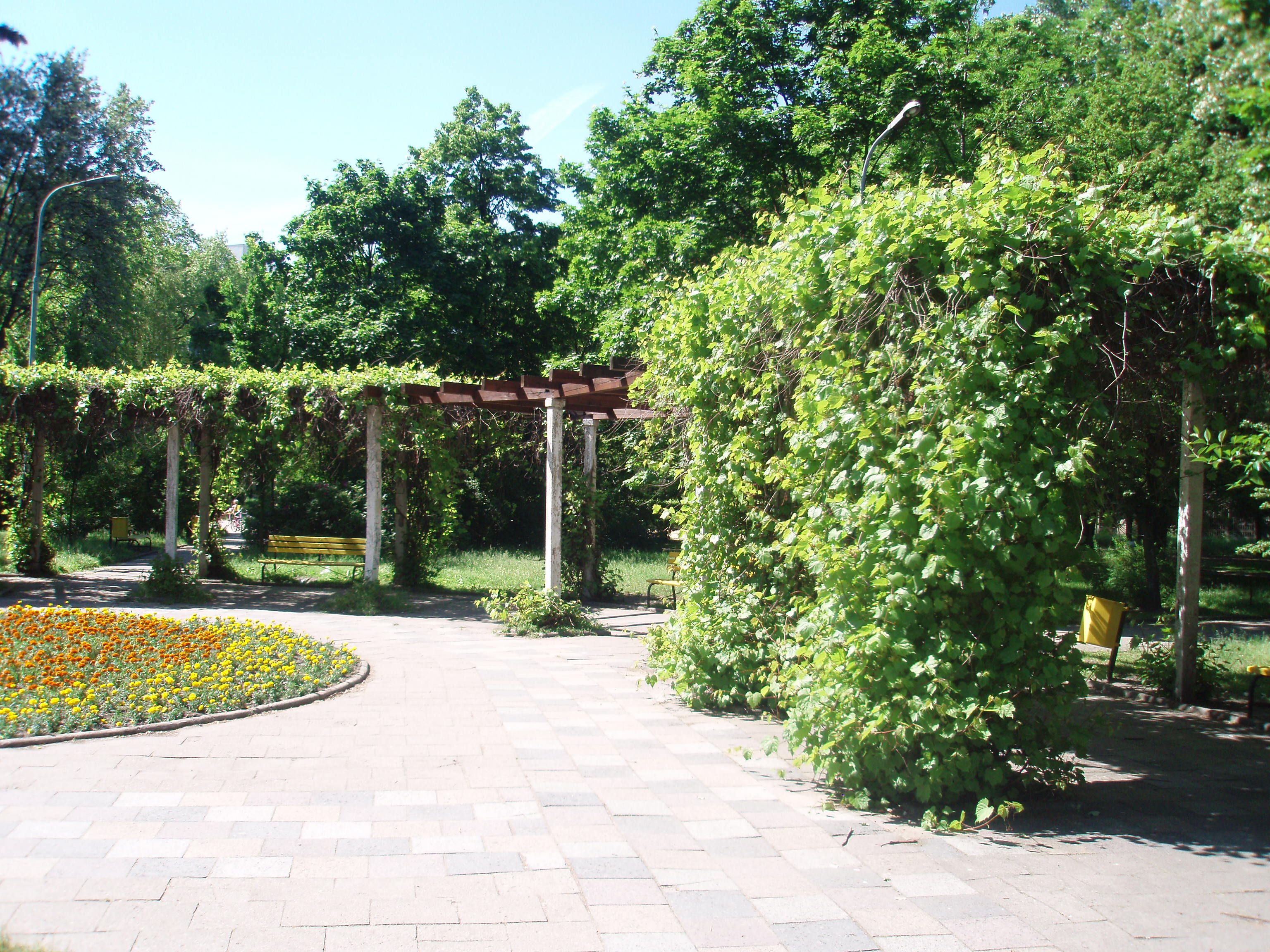 Widok na pergolę w Parku przy ul. Leczniczej